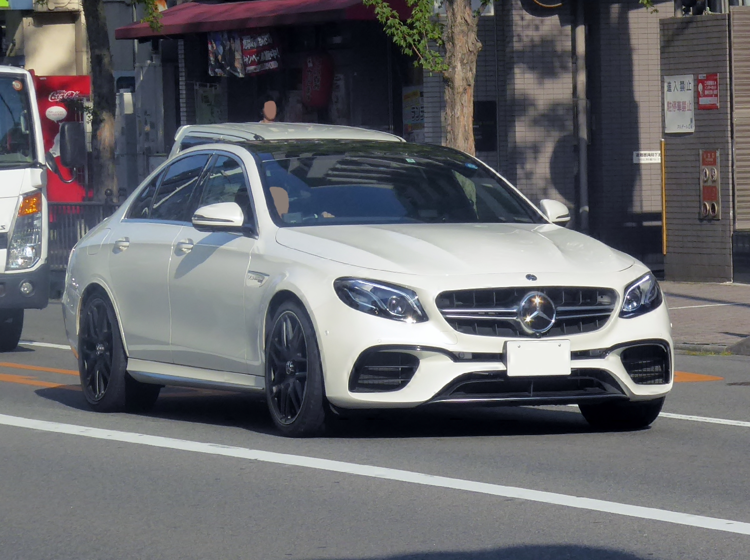 W213系メルセデスAMG・E63 S 4MATIC+を撮影。